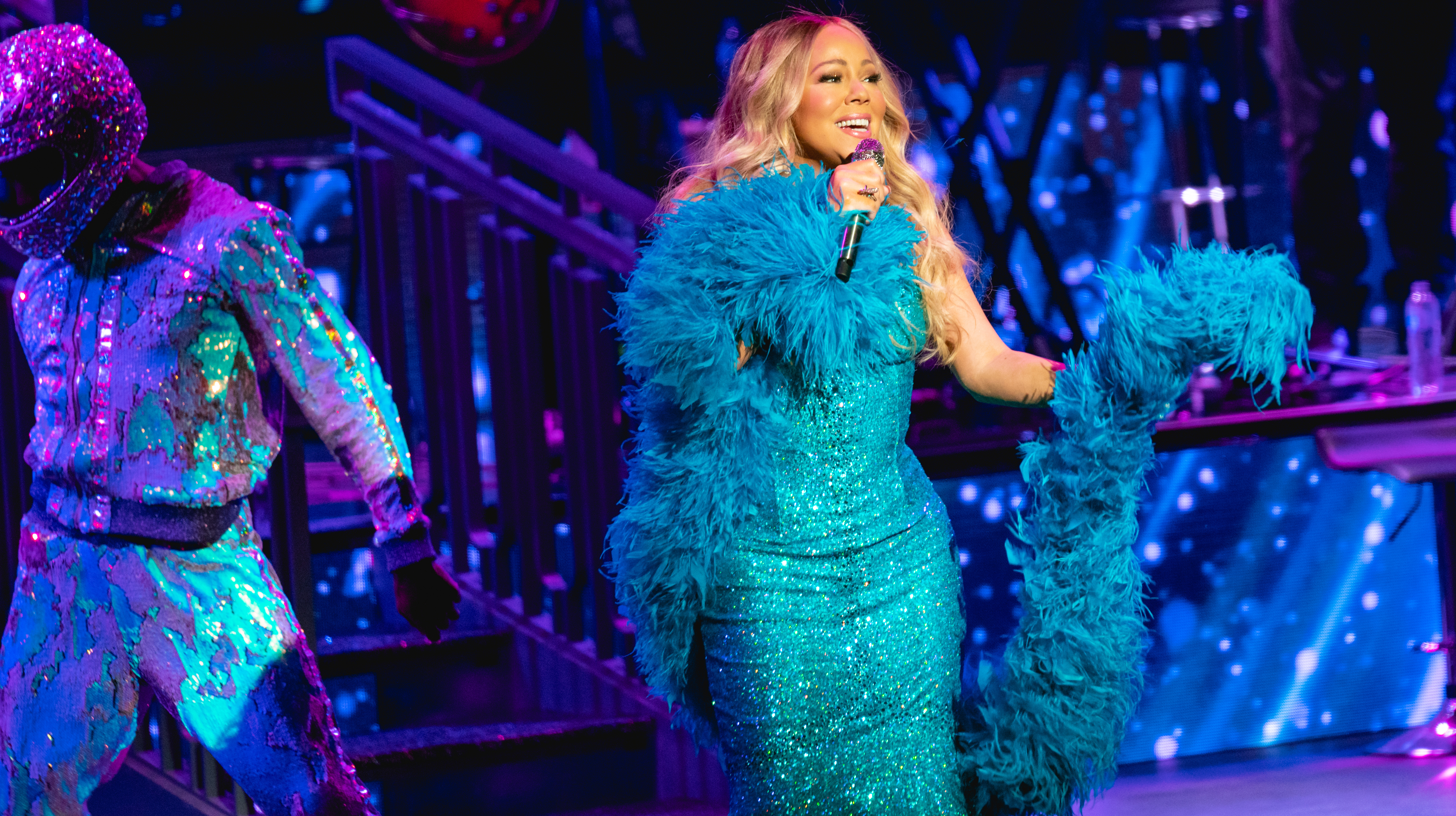 MariahRAH270519-57